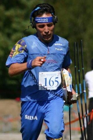 Шаршенов Бактыбек Чынгышбаевич на Чемпионате Мира по спортивной радиопеленгации. Чехия, 2004